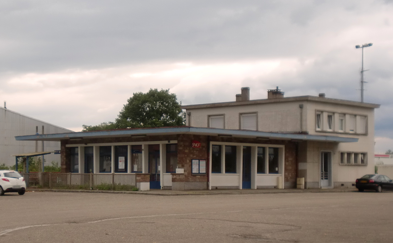 Gare de Schweighouse-sur-Moder